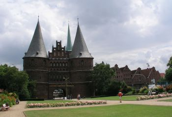 Das Holstentor in Lübeck